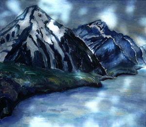 Eliška Bartek. ... a pak jsou tam ty hory, ktere spojuji me malířstvi s fotografii. Obraz se jmenuje Niesen a Stockhorn videno z Leissigenu. A sice v tom leisigenu byl Hodler, nejznamejsi svycarsky malir, ten tam vzdy maloval. a ja ty hory namalovala, pak jsem je postavila pod tu lipu pod kterou ten hodler vzdy stal a ta lipa vrhala svetlo a stiny na ten obraz a spojila v podstate minulost a soucastnost a pak jsem to ofotila a ten obraz znicila a ted existuje jenom ta fotka.